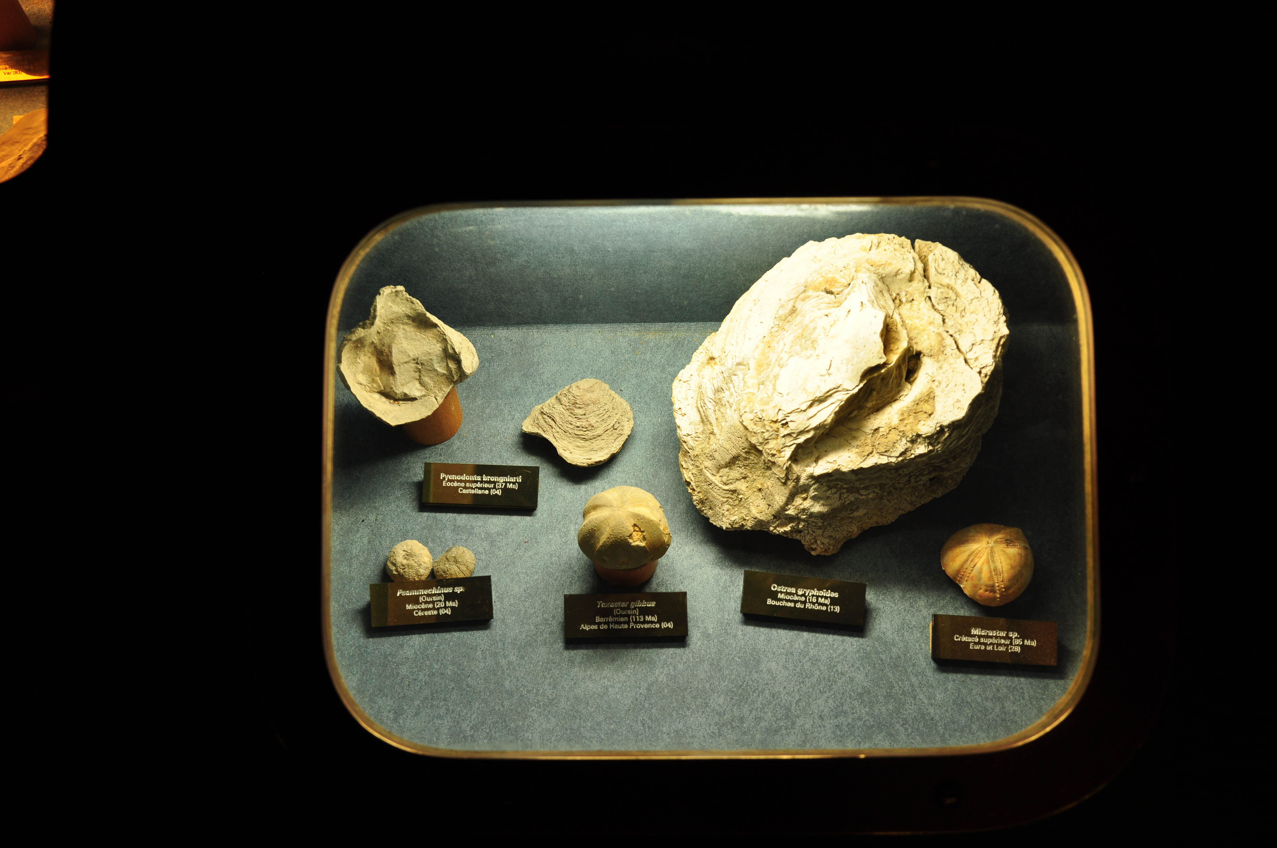 Oursins et huîtres au musée de Digne